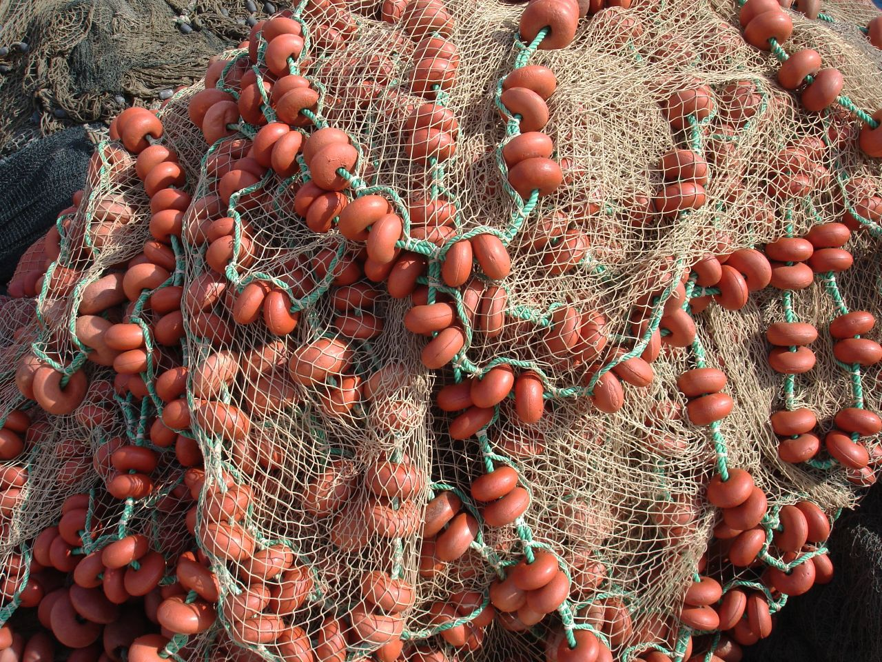 Port de Houmt Souk, Djerba